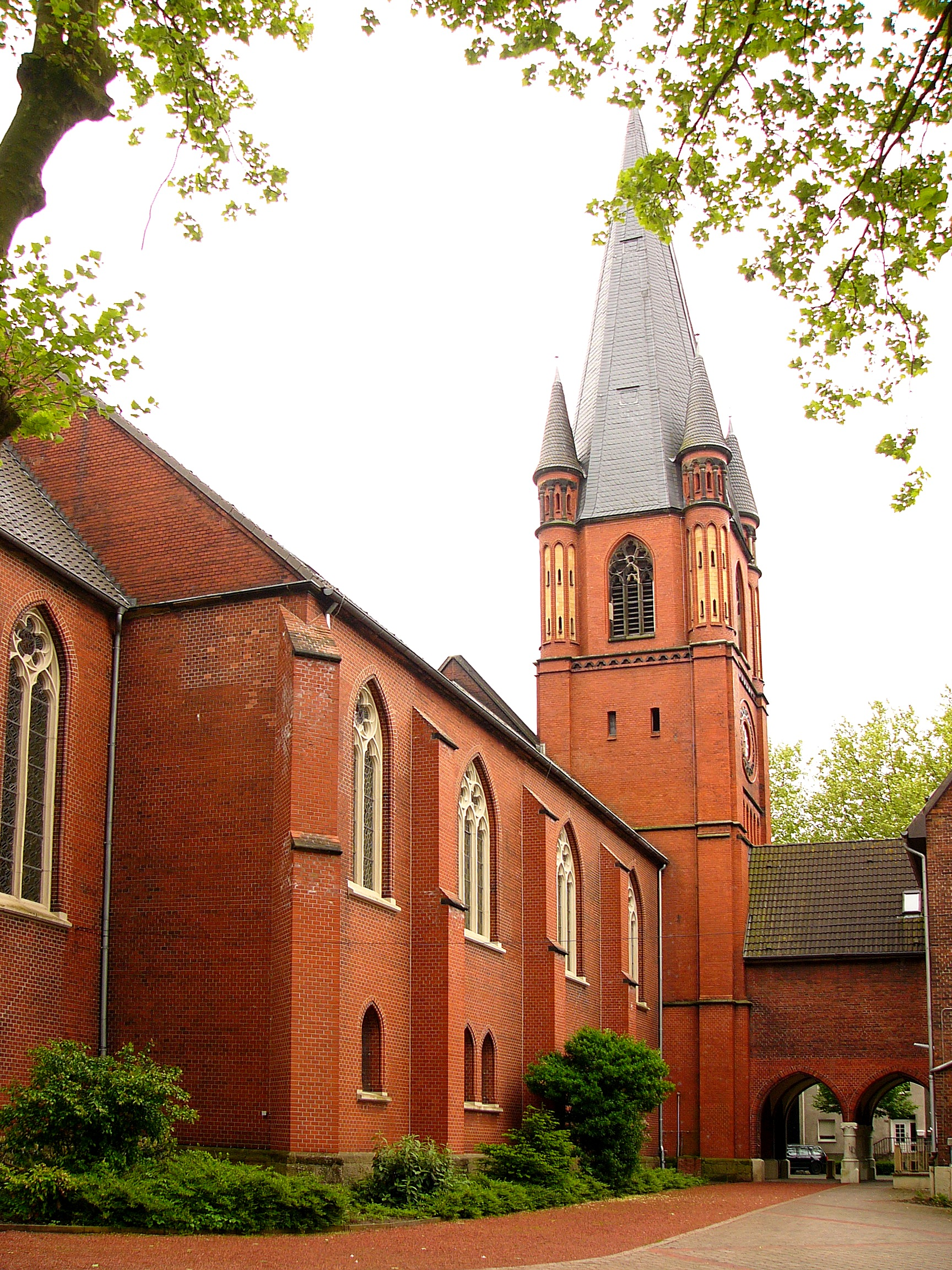 Ev. Christuskirche u. GemeindehausThis is a photograph of an architectural monument., no. 152